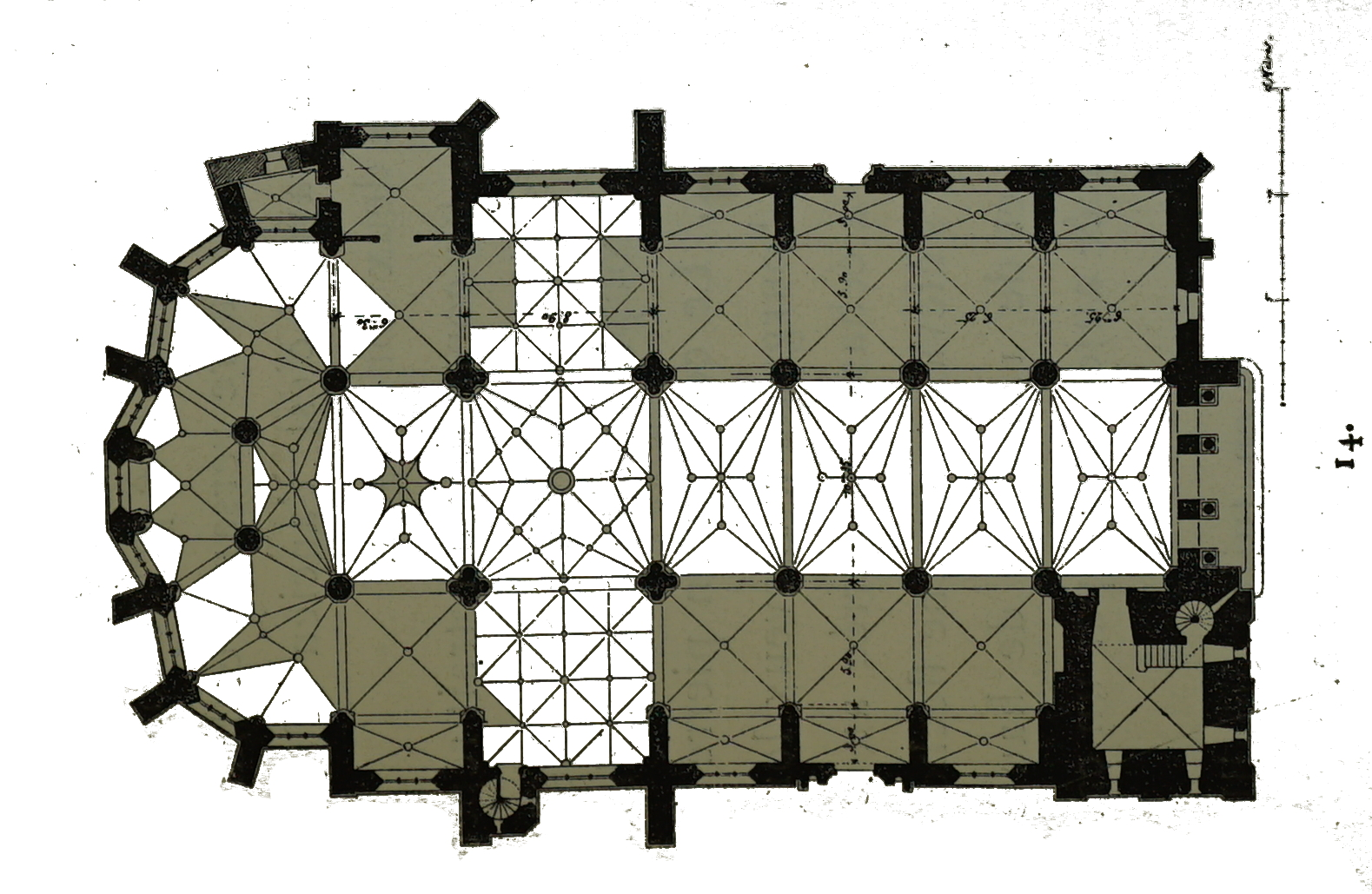 par un dessin de Fichot.